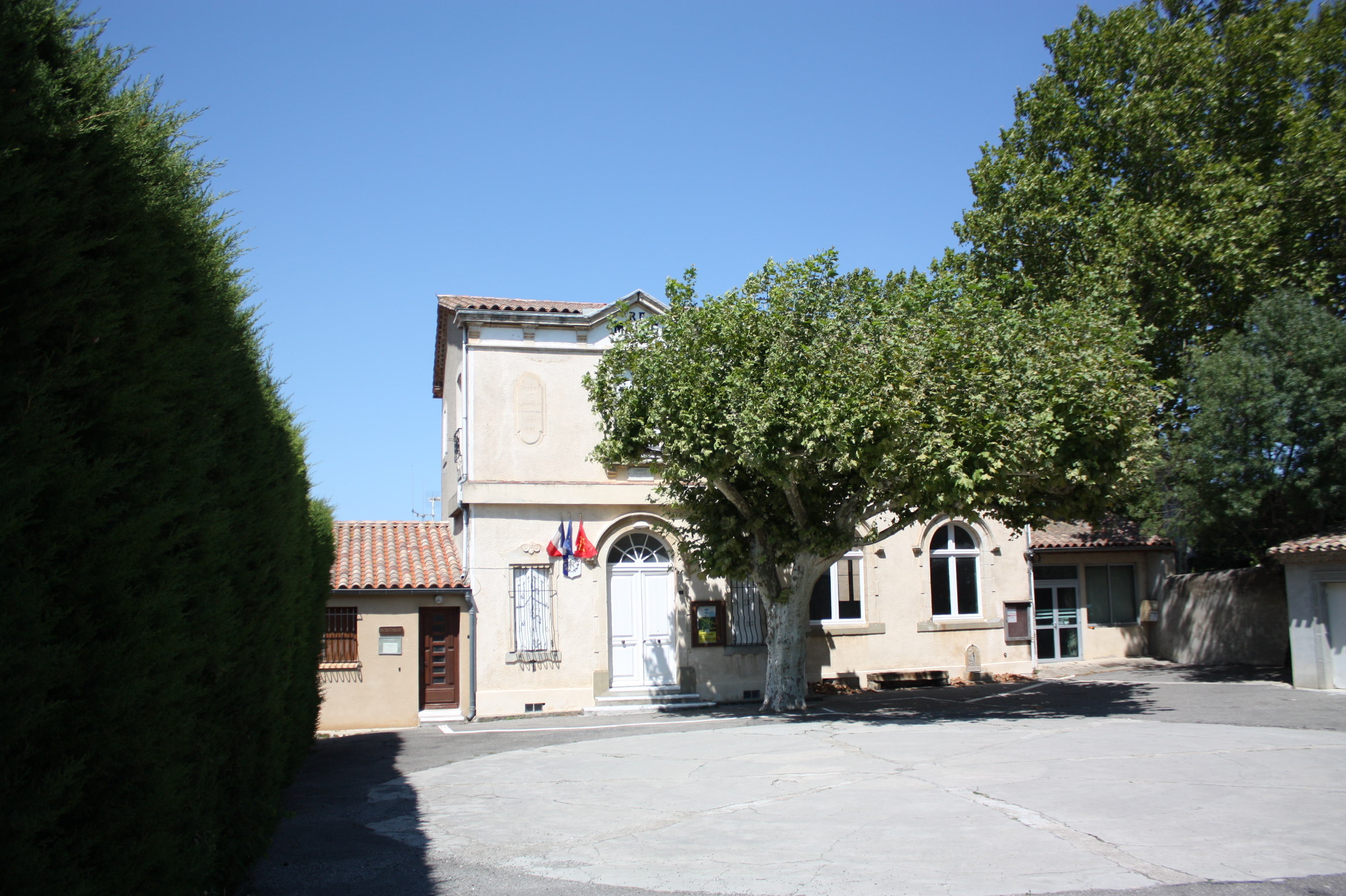 Mairie du village